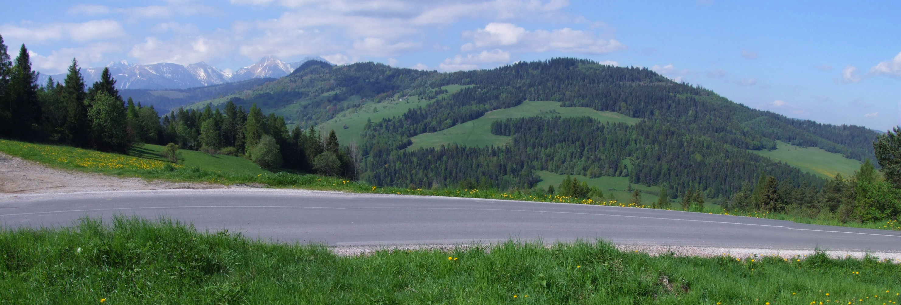 Przełęcz Hanuszowska. Widok na dolinę Frankowskiego Potoku, Zamagurze (północny grzbiet Magurki) i Tatry